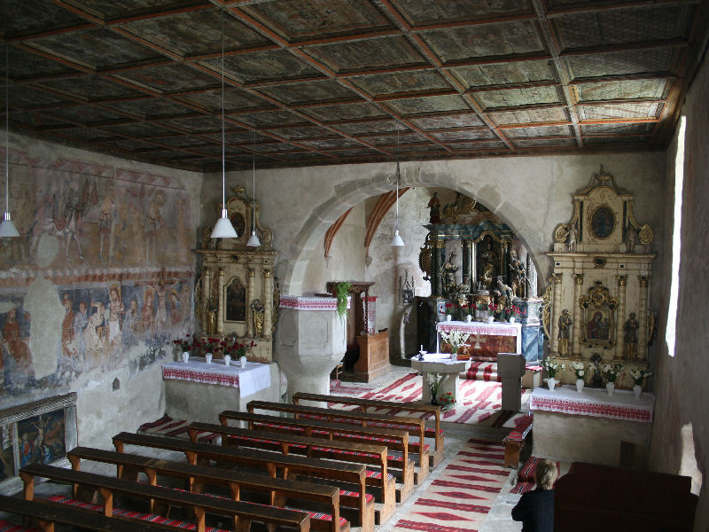 Biserica catolica din Ghelinta, sec.XIII; foto Iulian Hopulele